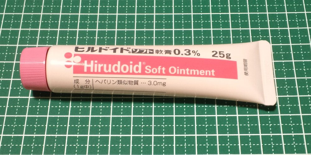 ヒルドイド®ソフト軟膏0.3% 25g（表）。2016年8月20日撮影。